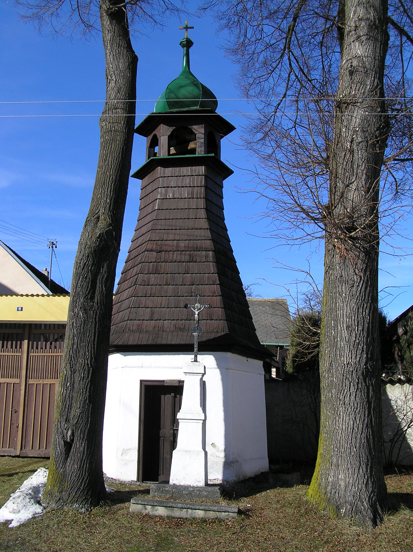 Kaple v Drážově